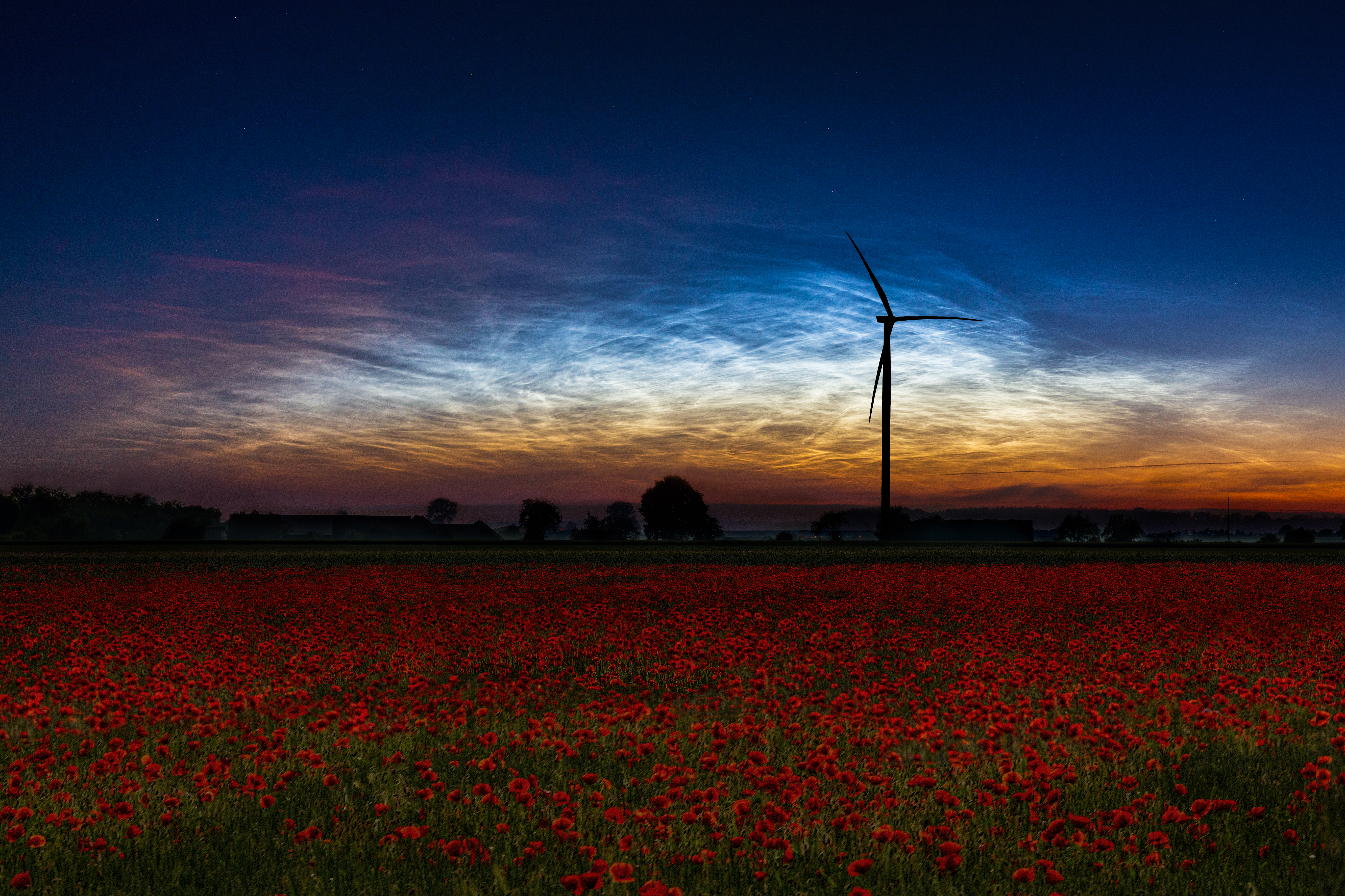 Obłoki srebrzyste nad polem maków w Koźminie Wielkopolskim